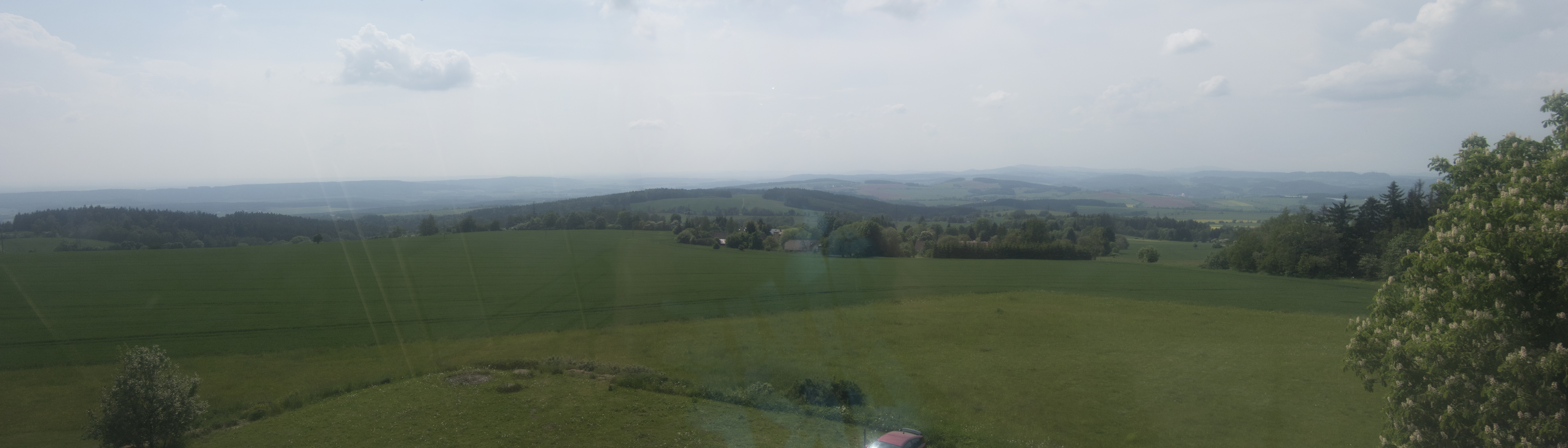 Rozhledna Zvičina z 28.5.2016 Panorama na jih